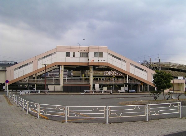 片浜駅 南から